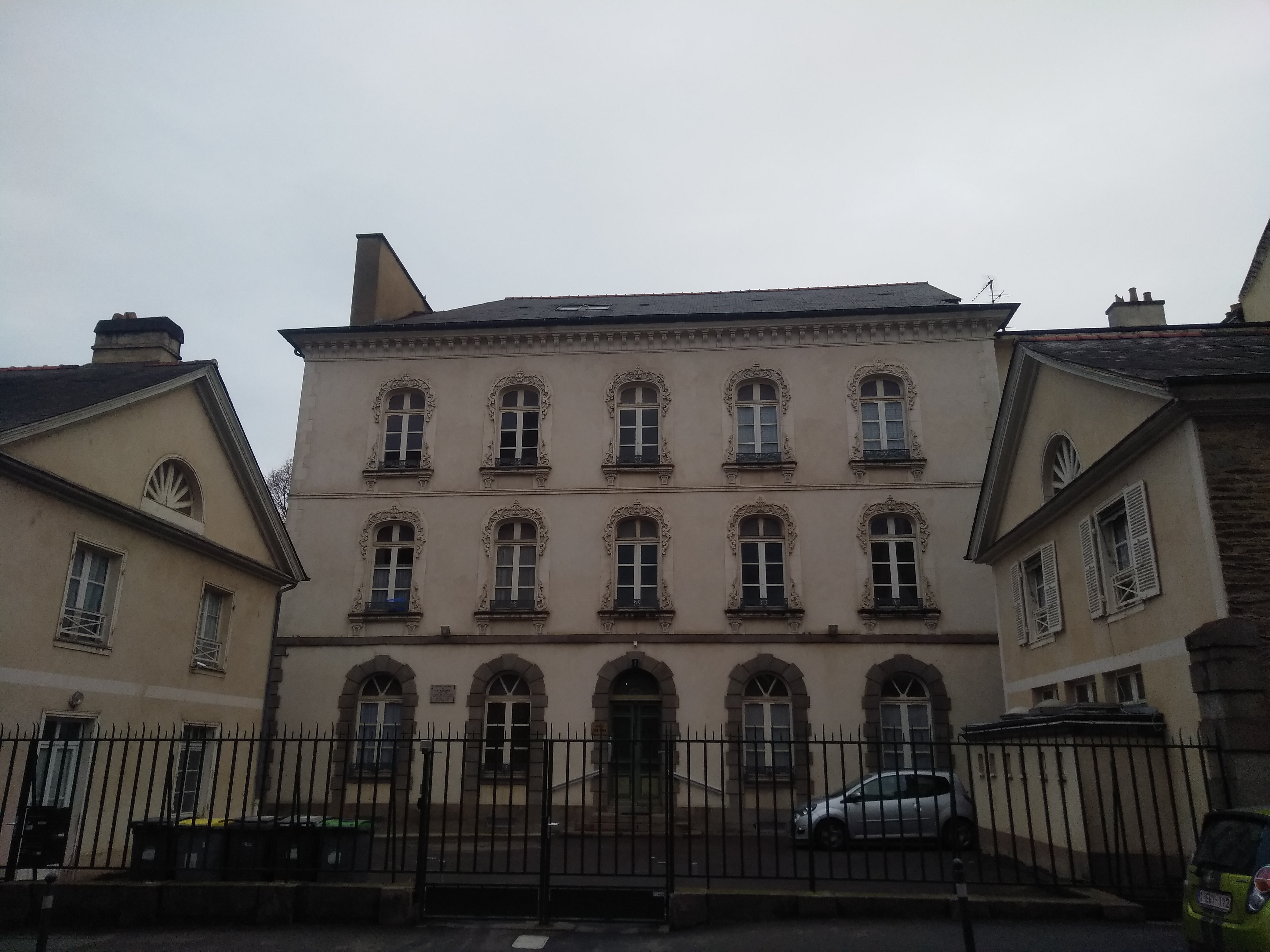 Rennes - hôtel de La Borderie. 22 rue Saint-Louis. Où a vécu Arthur de La Borderie